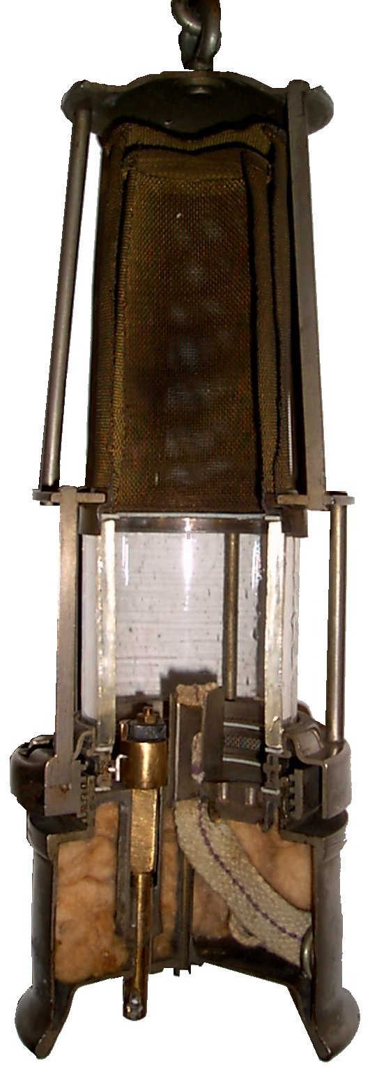 Schnittmodell einer Wetterlampe vom Typ Friemann&Wolf 300, selbst fotografiert. Diese Schnittmodelle wurden von der bedeutendsten Grubenlampenfabrik, Friemann&Wolf in Zwickau/Sa. serienmäßig als Anschauungsstücke hergestellt. Merkmale des Modells 300: vereinfachte untere Luftzufuhr über Siebring; Flachdocht.